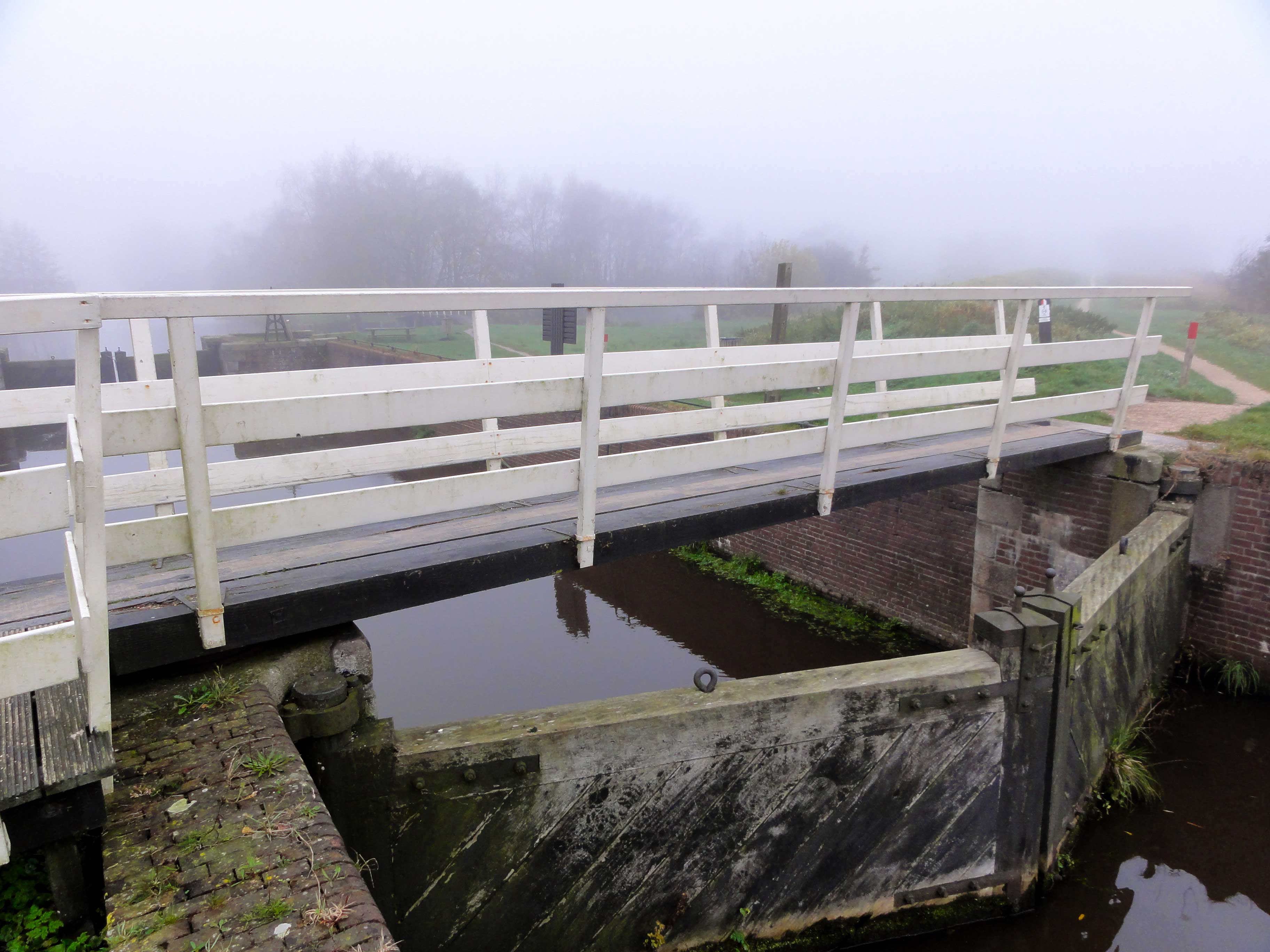 Scheenesluis bij de Scheene in de Rottige Meenthe en de Helomavaart